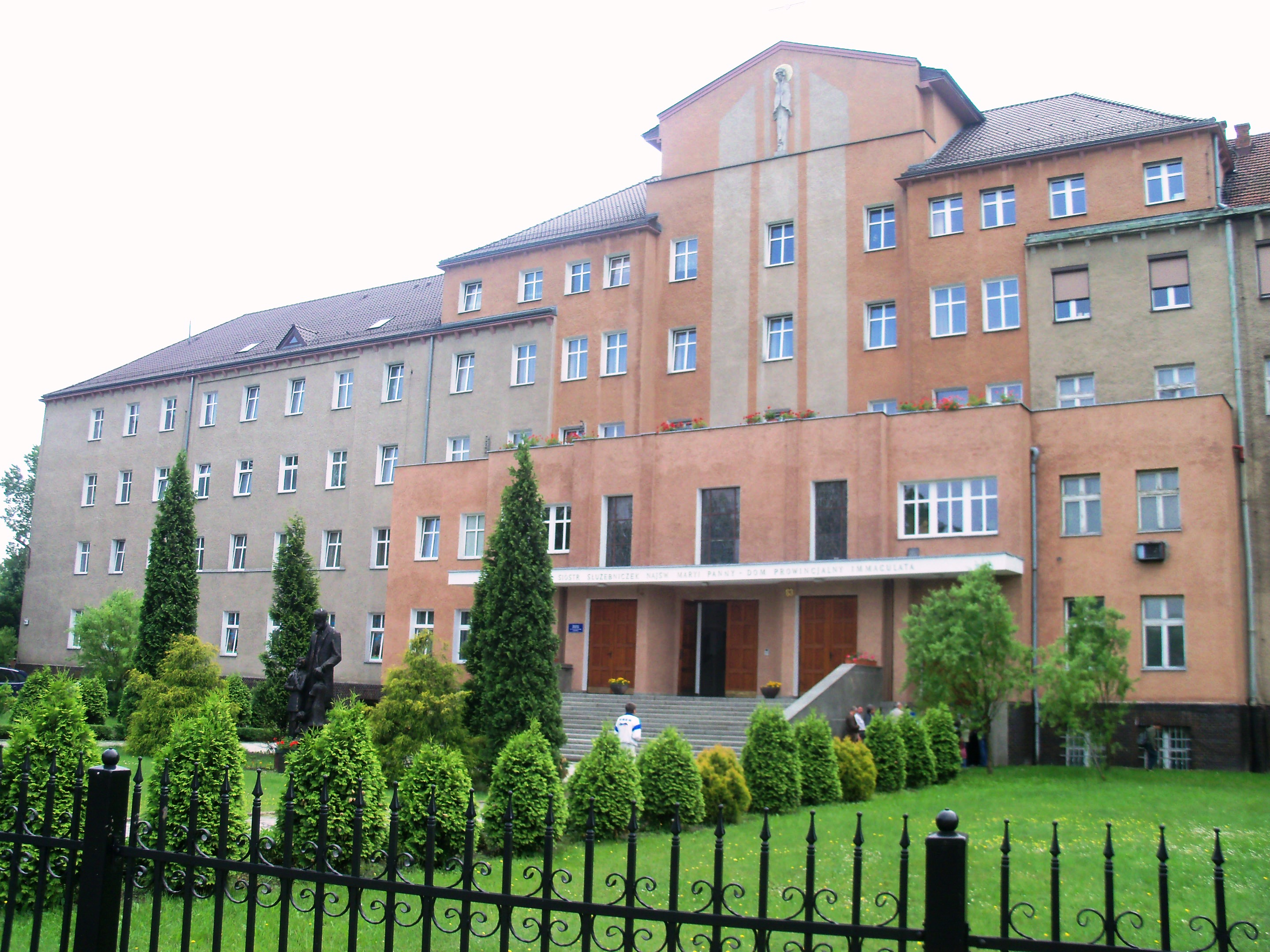 Prowincja katowicka Zgromadzenia Sióstr Służebniczek NMP (ul. Panewnicka 63) oraz dom zakonny Zgromadzenia Sióstr Służebniczek NMP (ul. Panewnicka 63)